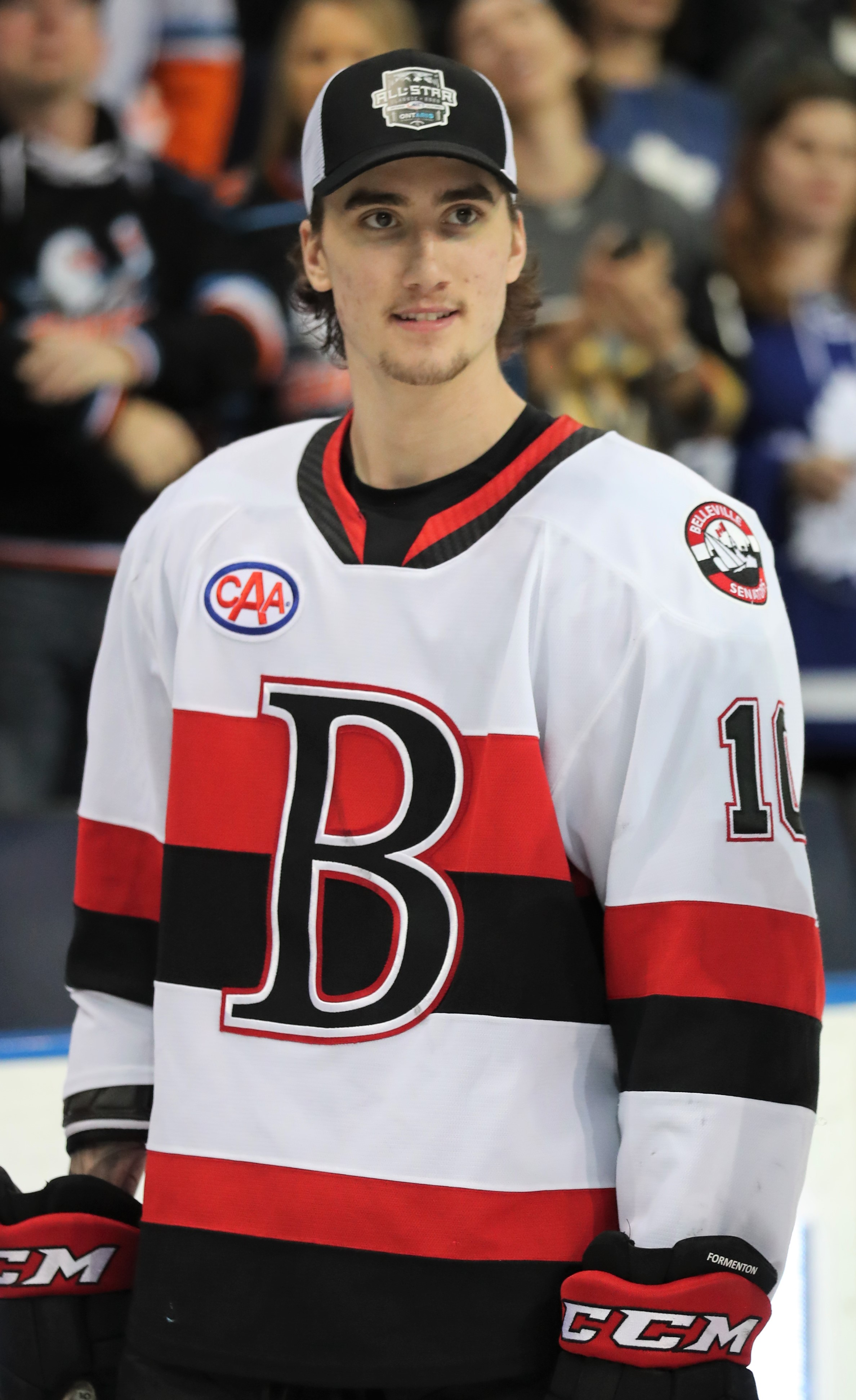 AA3I0693